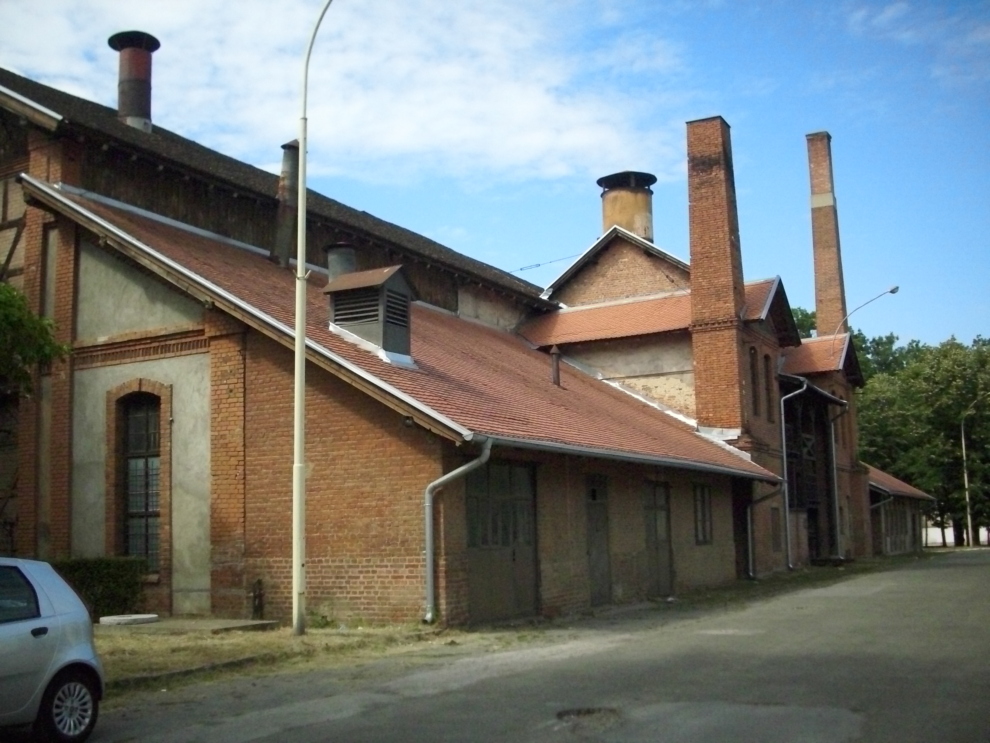 Зграда ливнице са ковачницом у Крагујевцу